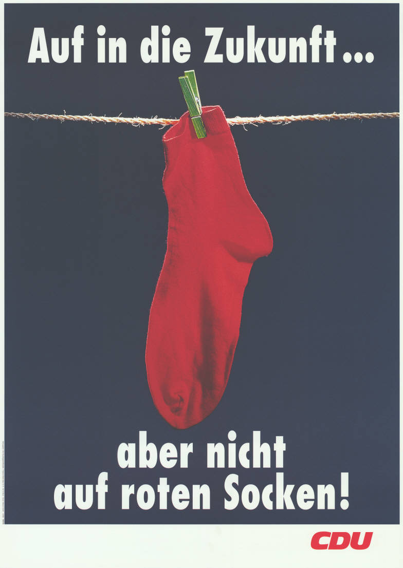 1994: Bundestagswahlplakat, Abbildung: Rote Socke mit grüner Wäscheklammer an einer Wäscheleine Kommentar: Vgl. Plakat Nr. 10-001-4003 Plakatart: Motiv-/Textplakat Auftraggeber: CDU-Bundesgeschäftsstelle, Bonn Drucker_Druckart_Druckort: Welzel & Hardt Objekt-Signatur: 10-031 : 50219 Bestand: CDU-Plakate (10-031) GliederungBestand10-18: CDU-Plakate (10-031) » Jubiläen » Posterset Lizenz: KAS/ACDP 10-031 : 50219 CC-BY-SA 3.0 DE